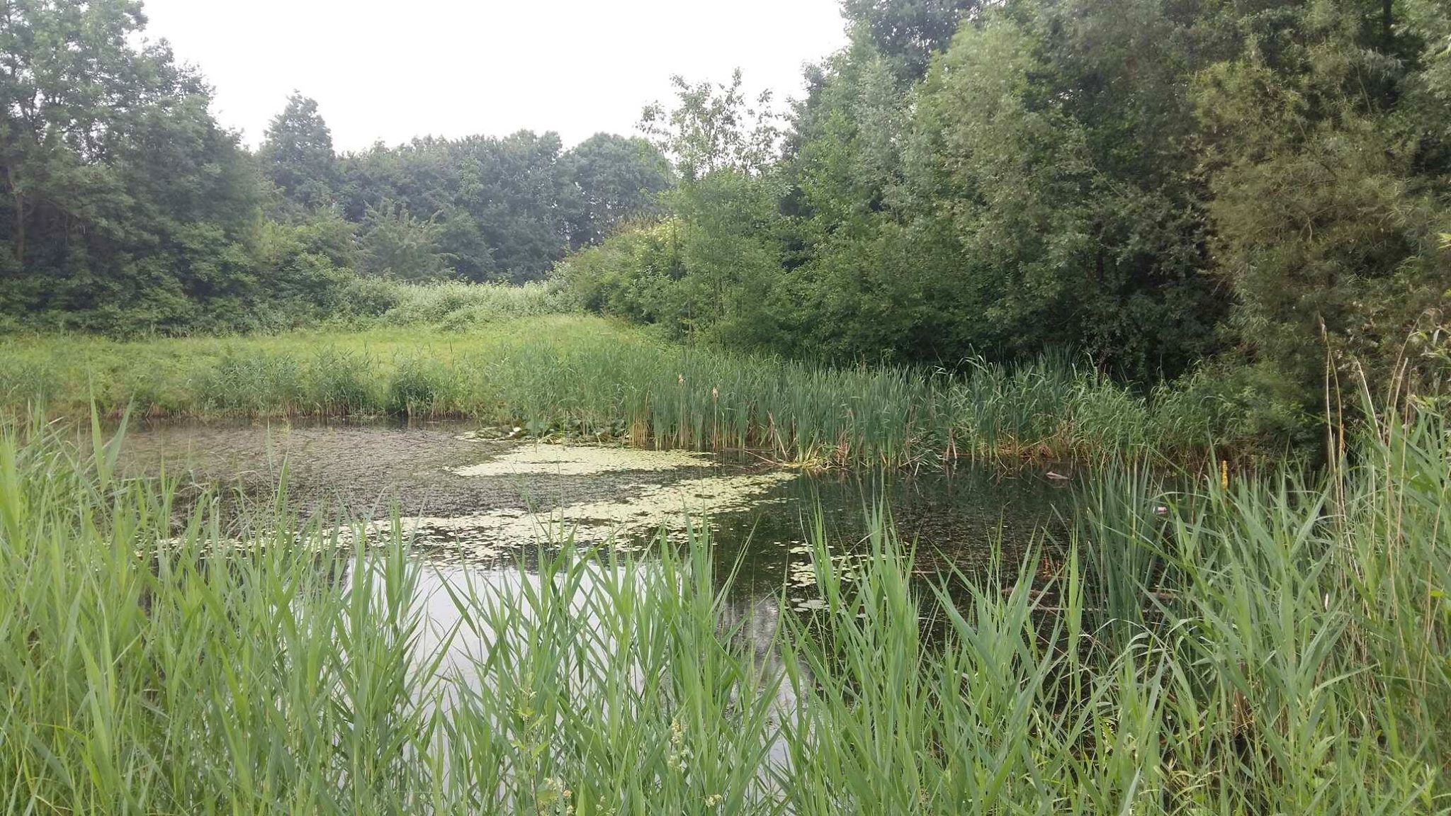 Poel is o.a. thuis voor waterlelies, amfibieën en watervogels.